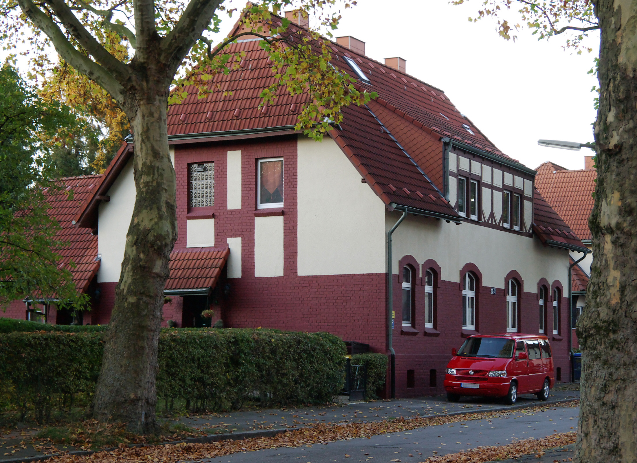 Kolonie Landwehr, Marsstraße, Dortmund